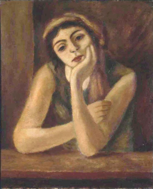 Femme accoudée (Marie), Léon Weissberg